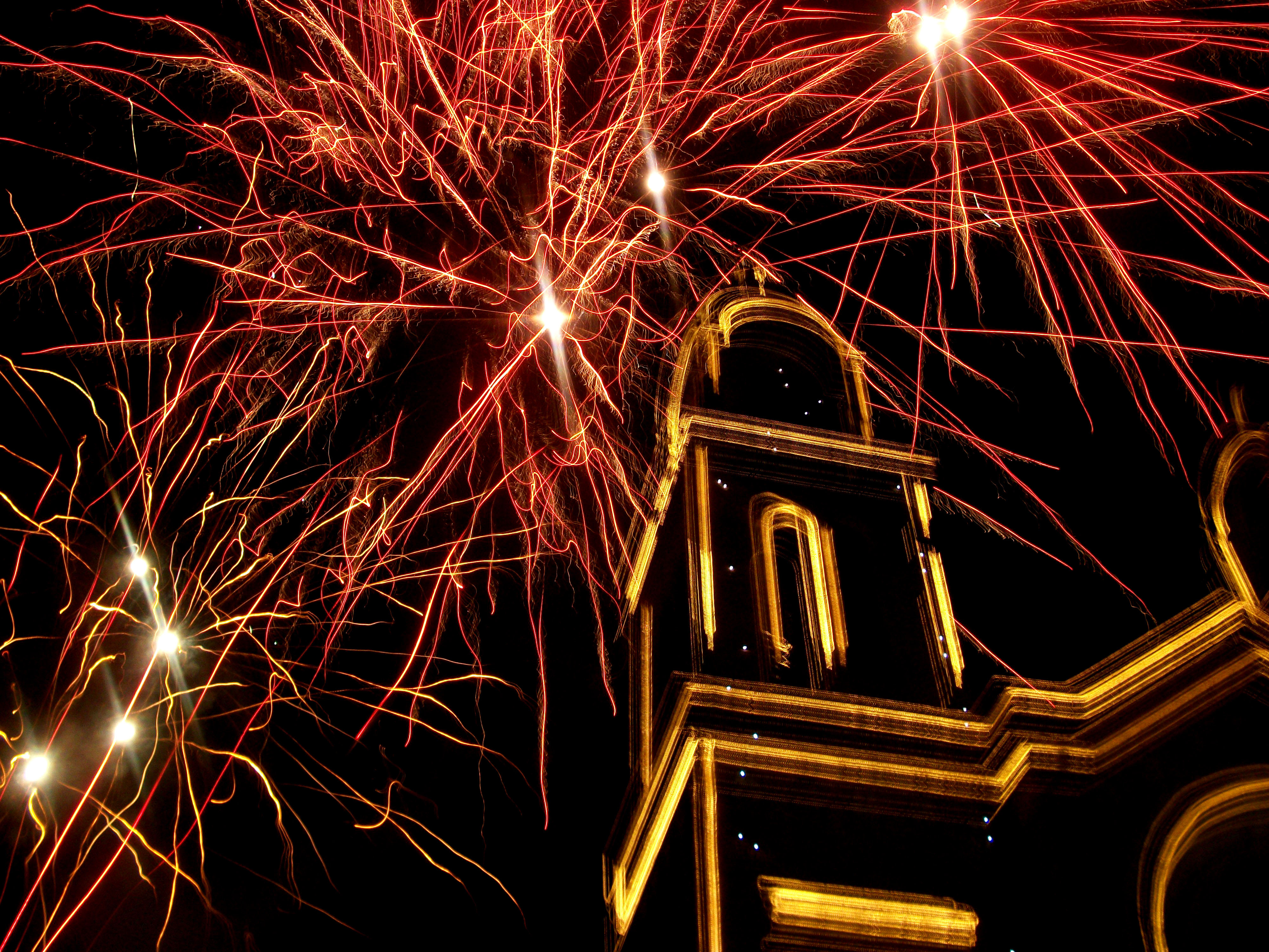 Fuegos artificiales en el Parque Central de Mosquera, Cundinamarca, para celebrar el inicio de la Navidad. Esta fotografía fue tomada en el municipio colombiano con código 25473.